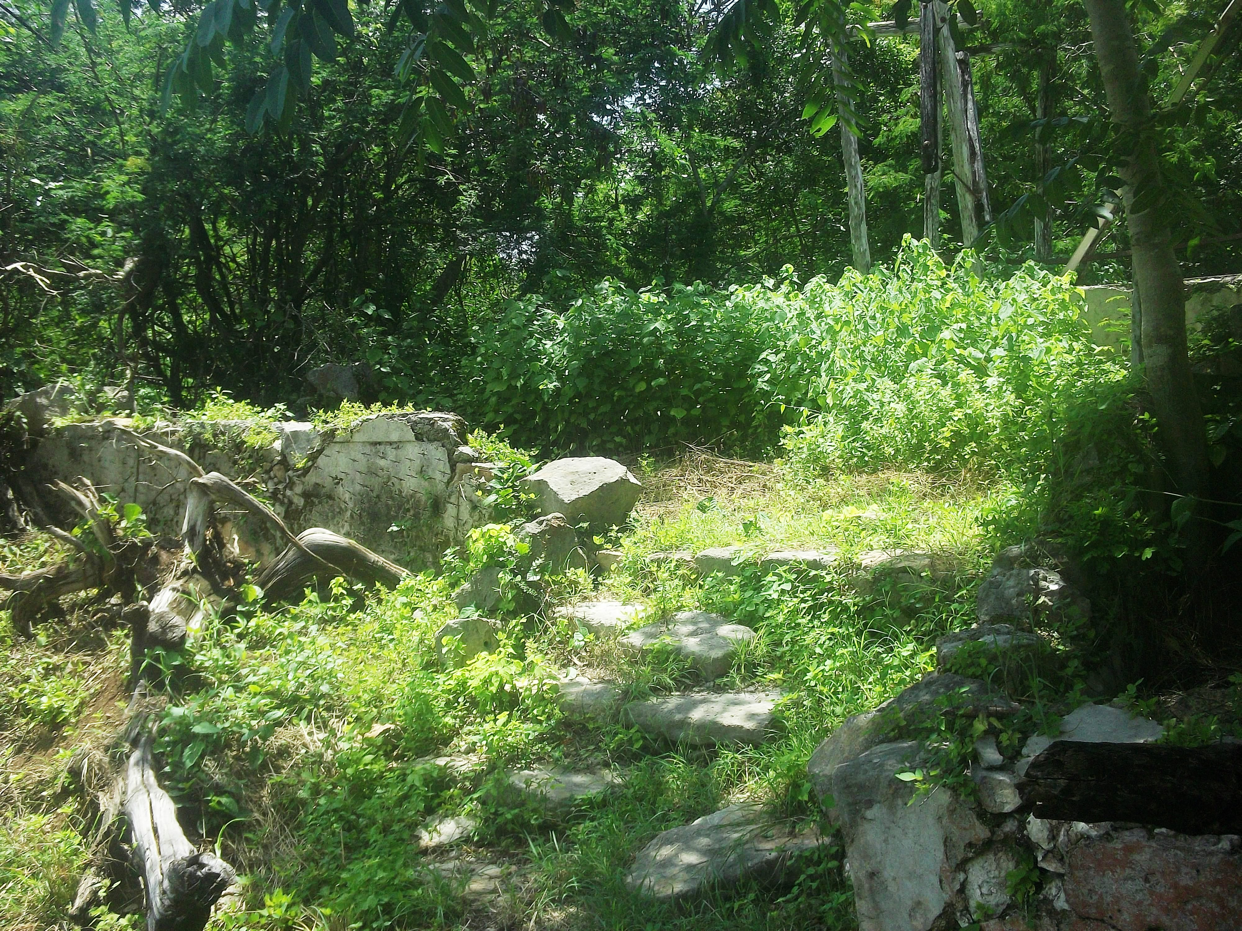 Hacienda San Juan Hau, Yucatán.